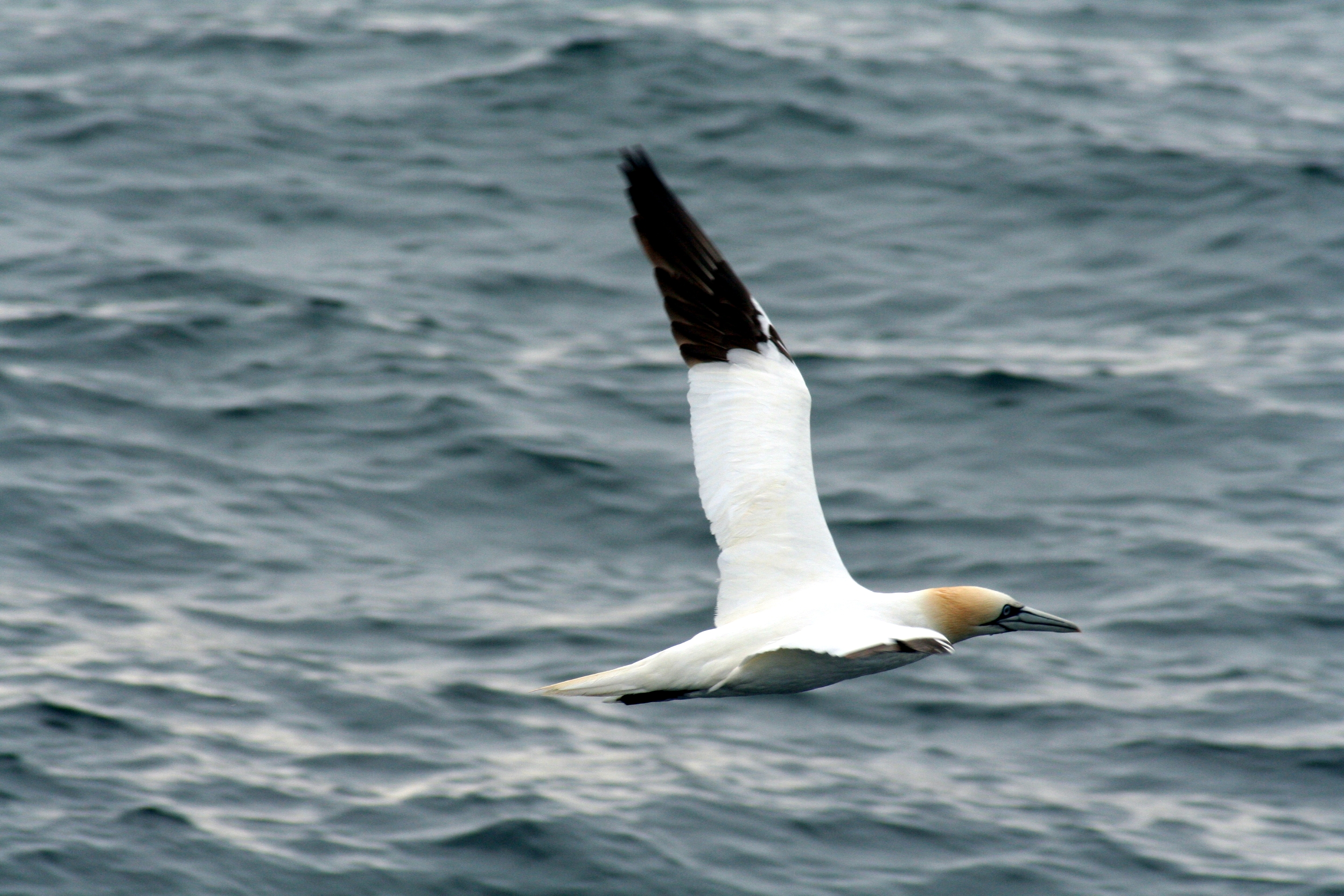 Alcatraz adulto (Morus bassanus) volando en la Reserva Natural de las 7 Islas (Bretaña francesa) en agosto de 2009.